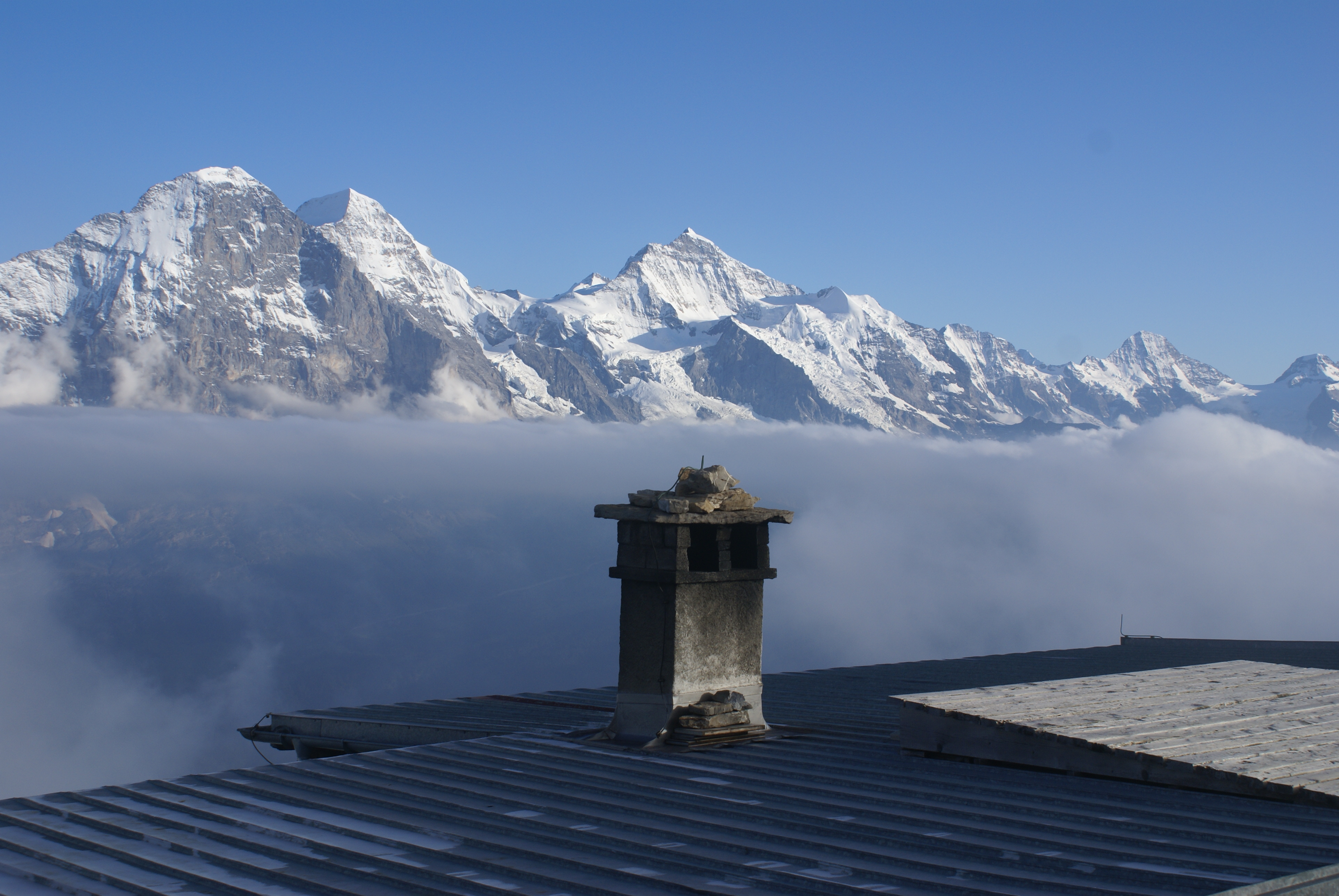 Eiger, Mönch, Jungfrau vom Faulhorn aus gesehen.